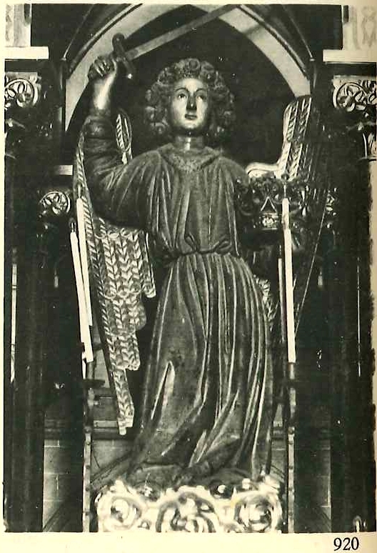 Àngel Custodi amb espasa i corona. Obra de 1466, destruïda el 1936, durant la guerra civil espanyola. Va ser encarregada pel municipi de Barcelona per a commemorar el fi de la pesta. Va estar instal·lada al Portal del Àngel. (Llompart, Gabriel. El Ángel Custodio en la Corona de Aragón en la Baja Edad Media dins de Fêtes et liturgie Actes du Colloque tenu à la Casa de Velazquez, 12-14/12/1985. ISBN: 978-84-86839-10-9, pàg. 252)